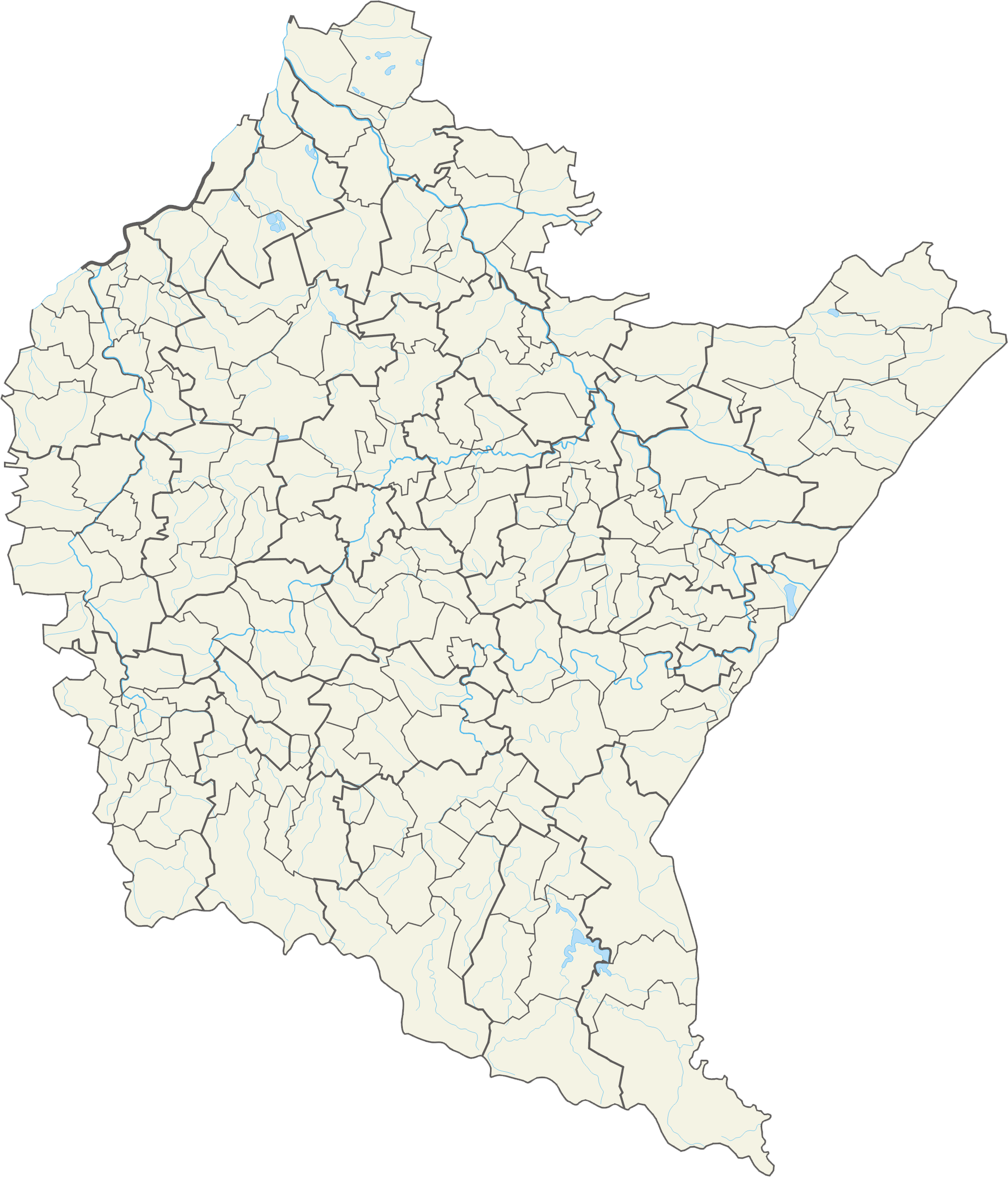 Województwo podkarpackie – powiaty i gminyWspółrzędne graniczne mapy: N: 50.8205° N S: 49.0020° N W: 21.1401° E E: 23.5478° E